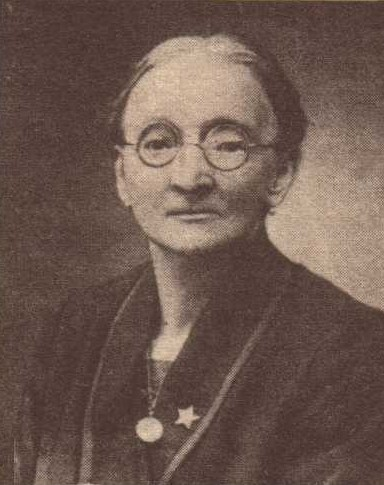 Marie Vydrová (1851-1946), česká a československá politička